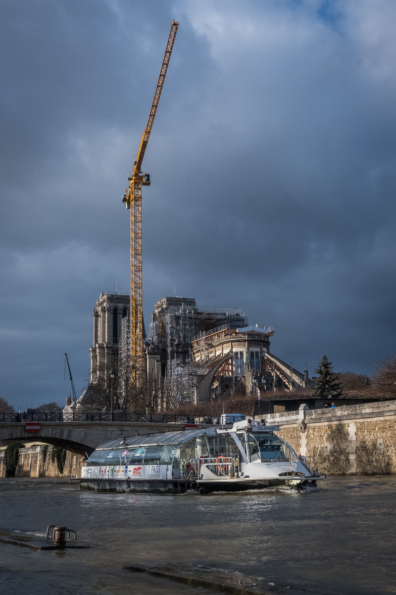 Notre-Dame de Paris Batobus et grue géante février 2020